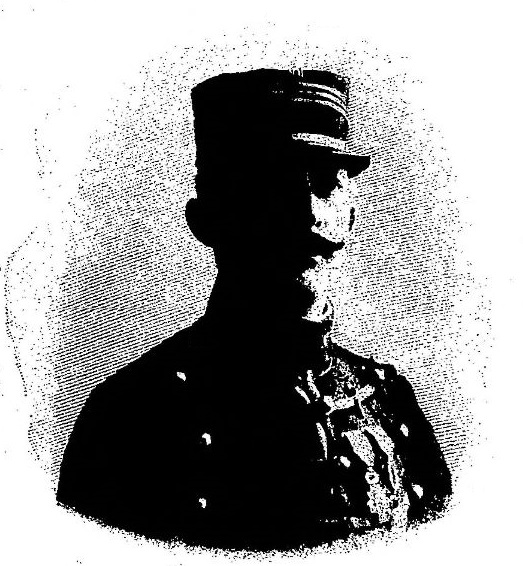 Le capitaine Raoul de Boigne en 1905.